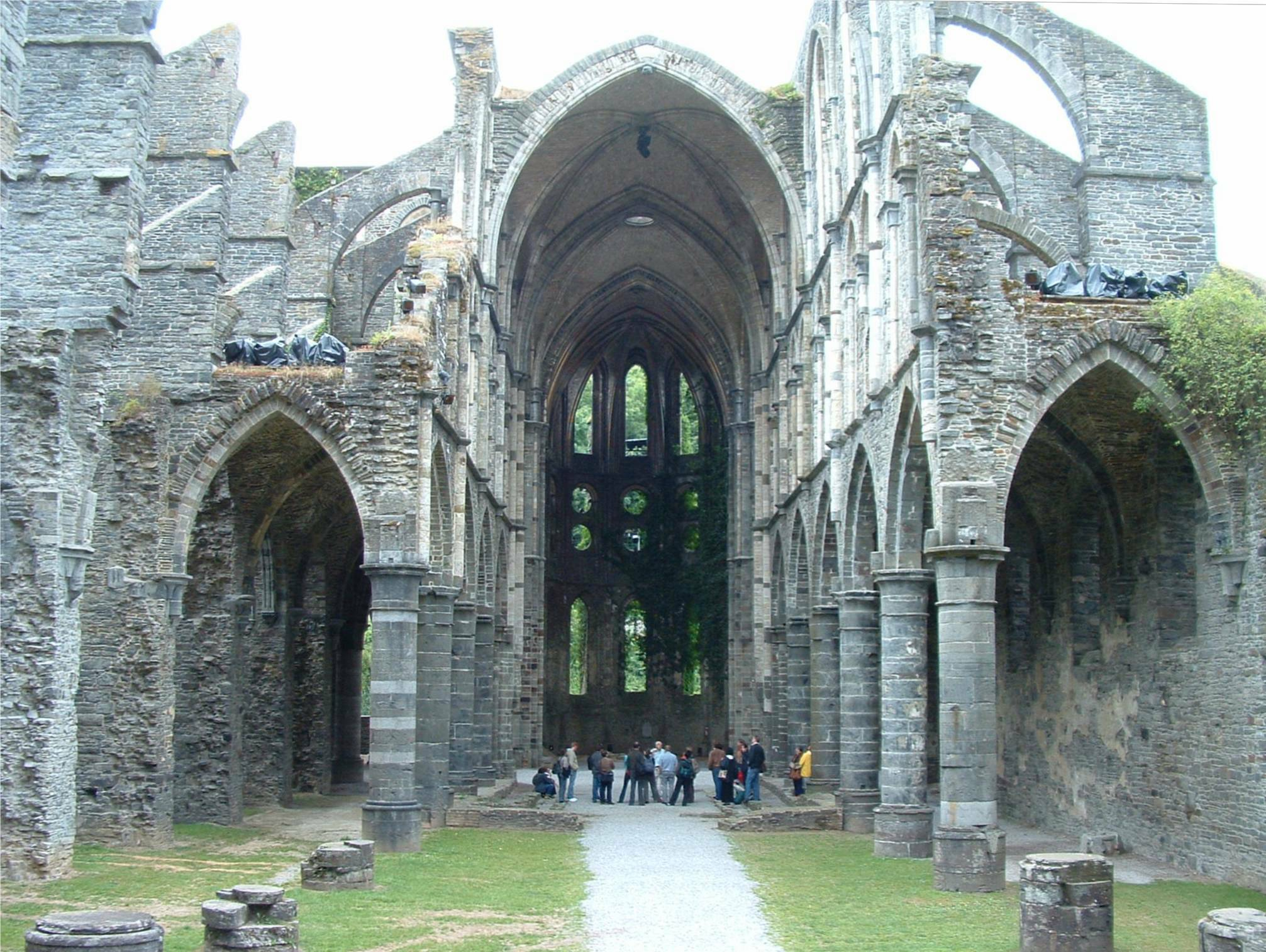 doorsnede gotische kerk. De abdijkerk van Villers (Foto: G. Debognies).